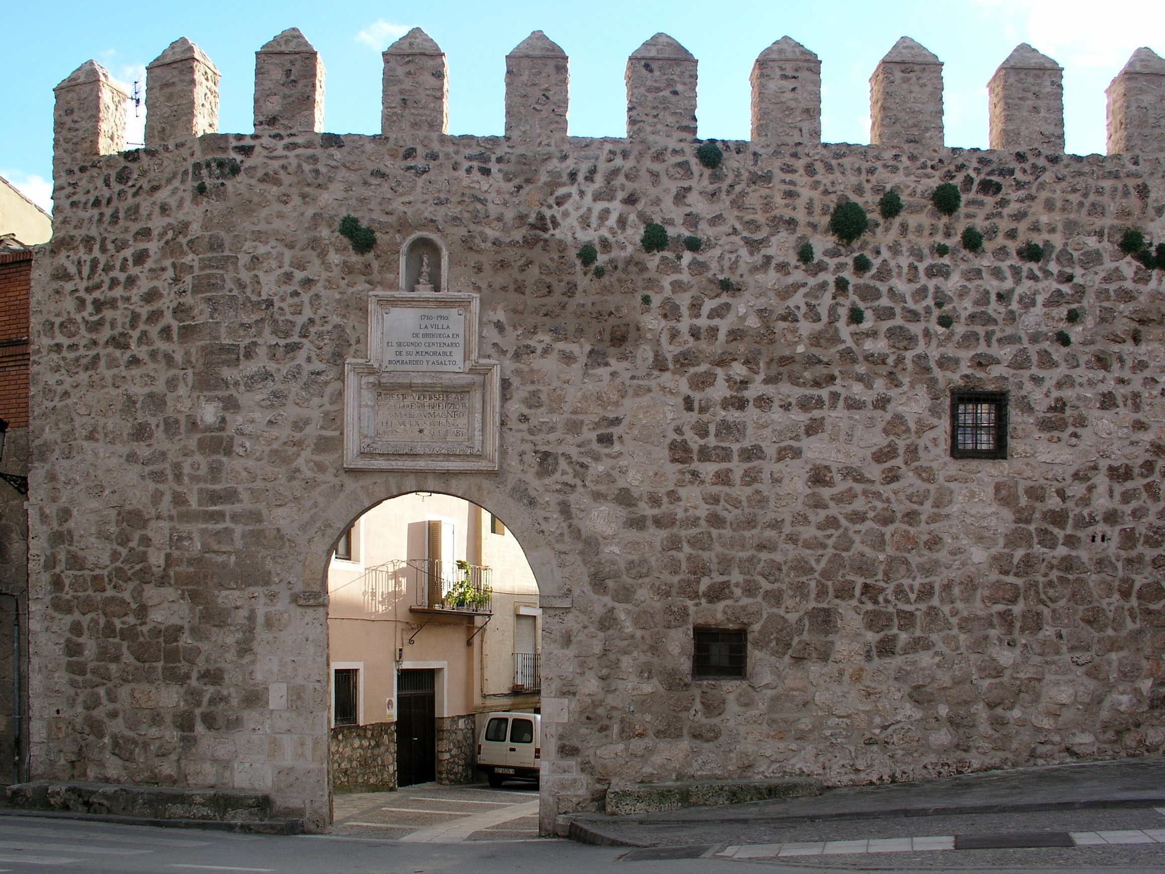 Brihuega, Puerta de la Cadena, Provincia de Guadalajara, Spain